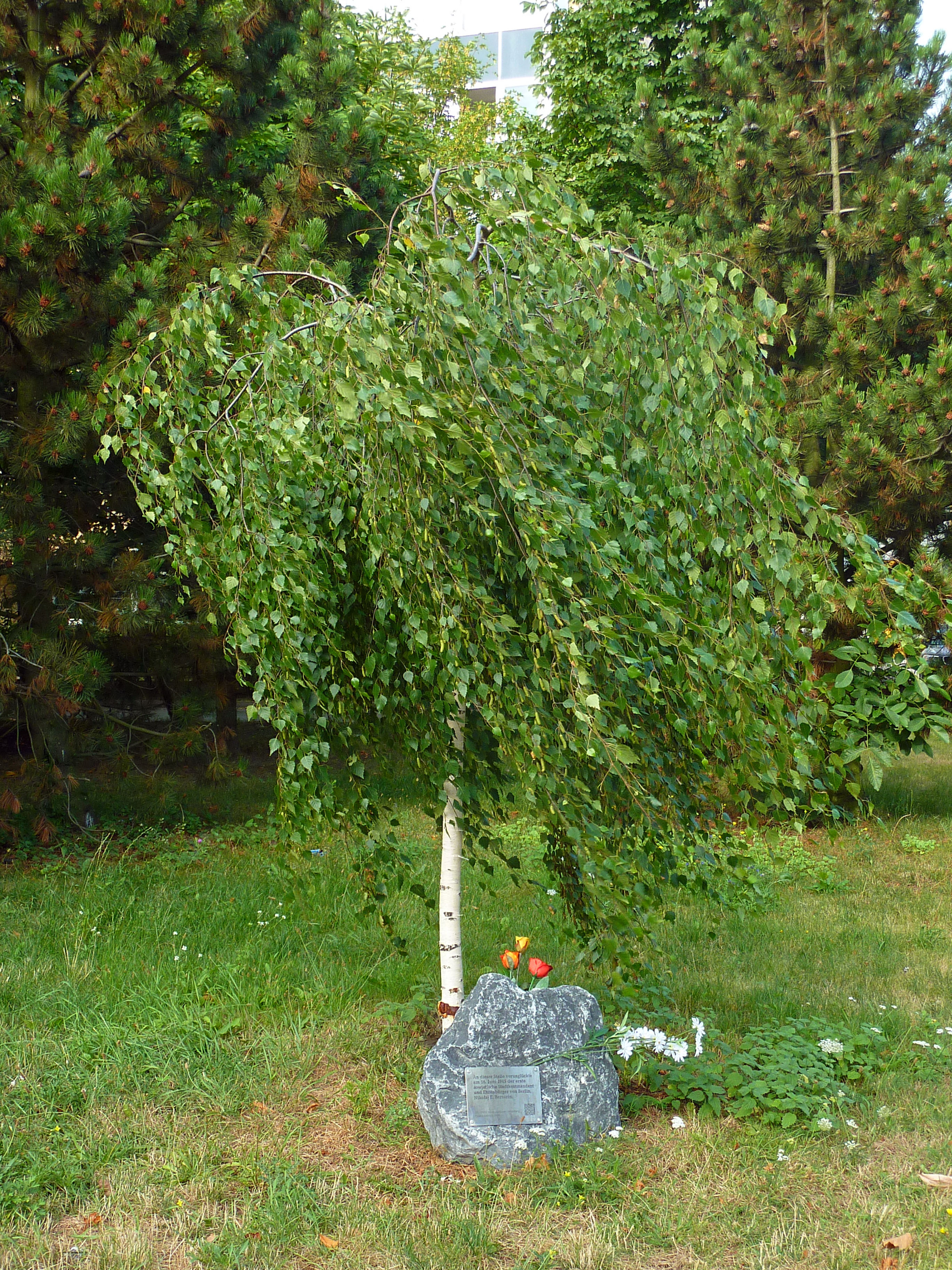 Am 16. Juni 2005 gepflanzte Bersarin-Birke in Berlin-Friedrichsfelde, Am Tierpark, Ecke Alfred-Kowalke-Straße, dem vermeintlichen Unfallort; zusammen mit dem am 24. Juni 2013 offiziell eingeweihten Gedenkstein. [1]